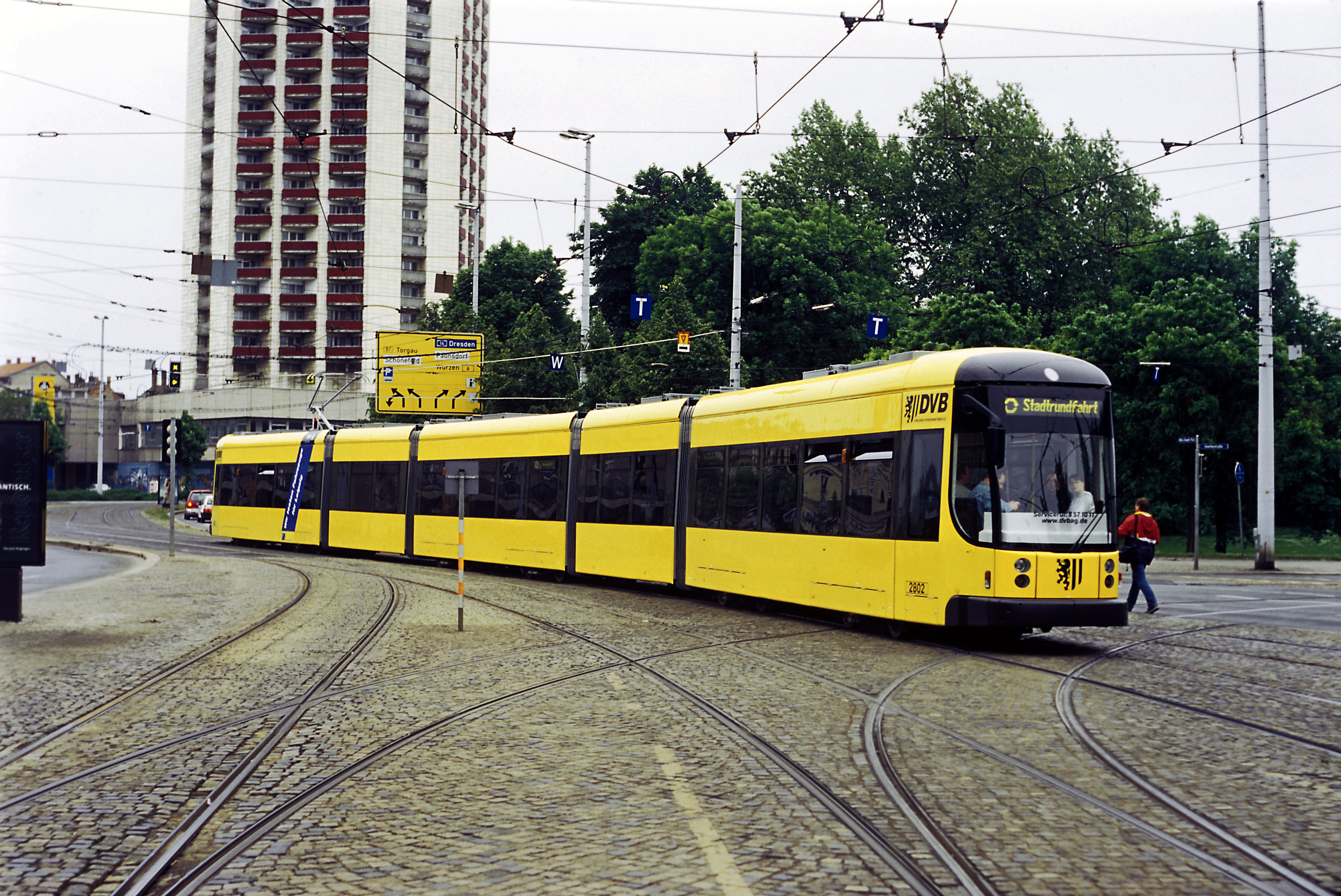 Vorstellungsfahrt durch den Hersteller in Leipzig, die Einheit wurde direkt von Bautzen mit bereits angepassten Radsätzen nach Leipzig gebracht und noch vor den ersten Fahrten mit Fahrgästen in Dresden der Öffentlichkeit vorgestellt. Noch im selben Jahr bestellten die LVB nur leicht veränderte Fahrzeuge. Die Vorführung eines Erfurter Combino hinterließ deutlich weniger günstige Eindrücke. Auf dem östlichen Willy-Brandt-Platz zwischen Goethestraße und Georgiring, leider nur als Nachschuss der türlosen Seite.